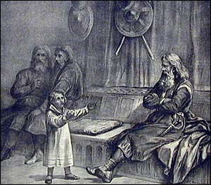 Inga fra Varteig: Den lille Håkon Håkonsson hos Helge Vasse, fra gammelt stikk.